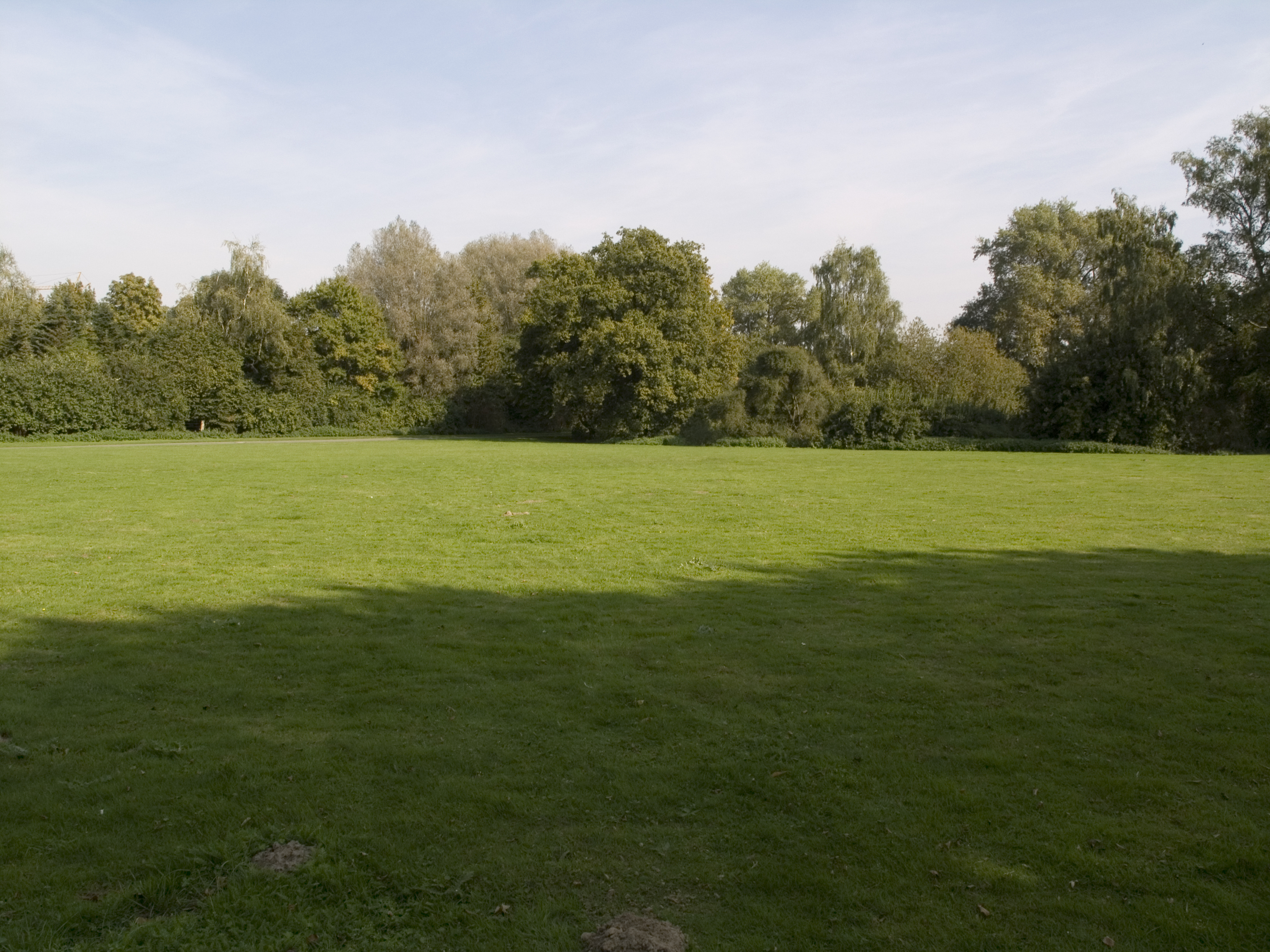 Северный Рейн - Вестфалия, Мюнстер - парк Аазее